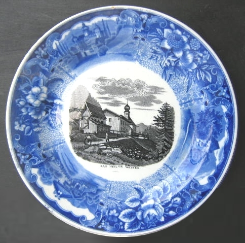 Assiette en faïence de Schramberg, XIXe siècle